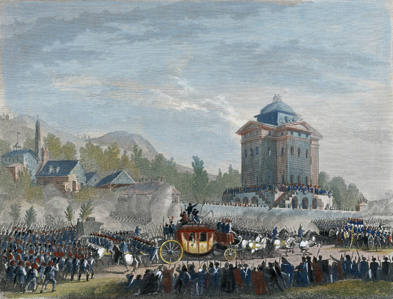 Luigi XVI ritorna da Varennes